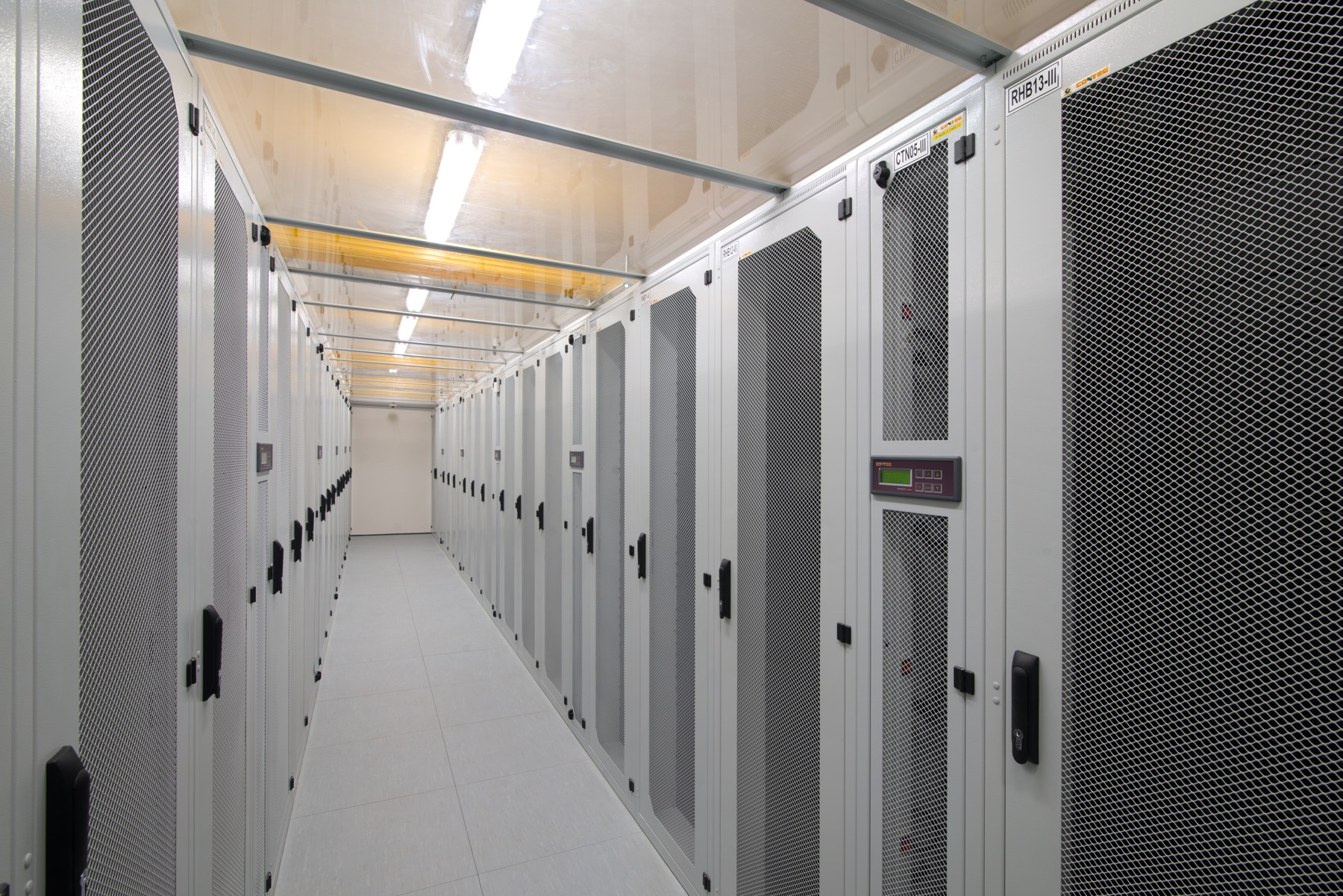 Datové centrum Technologického centra Písek - studená ulička